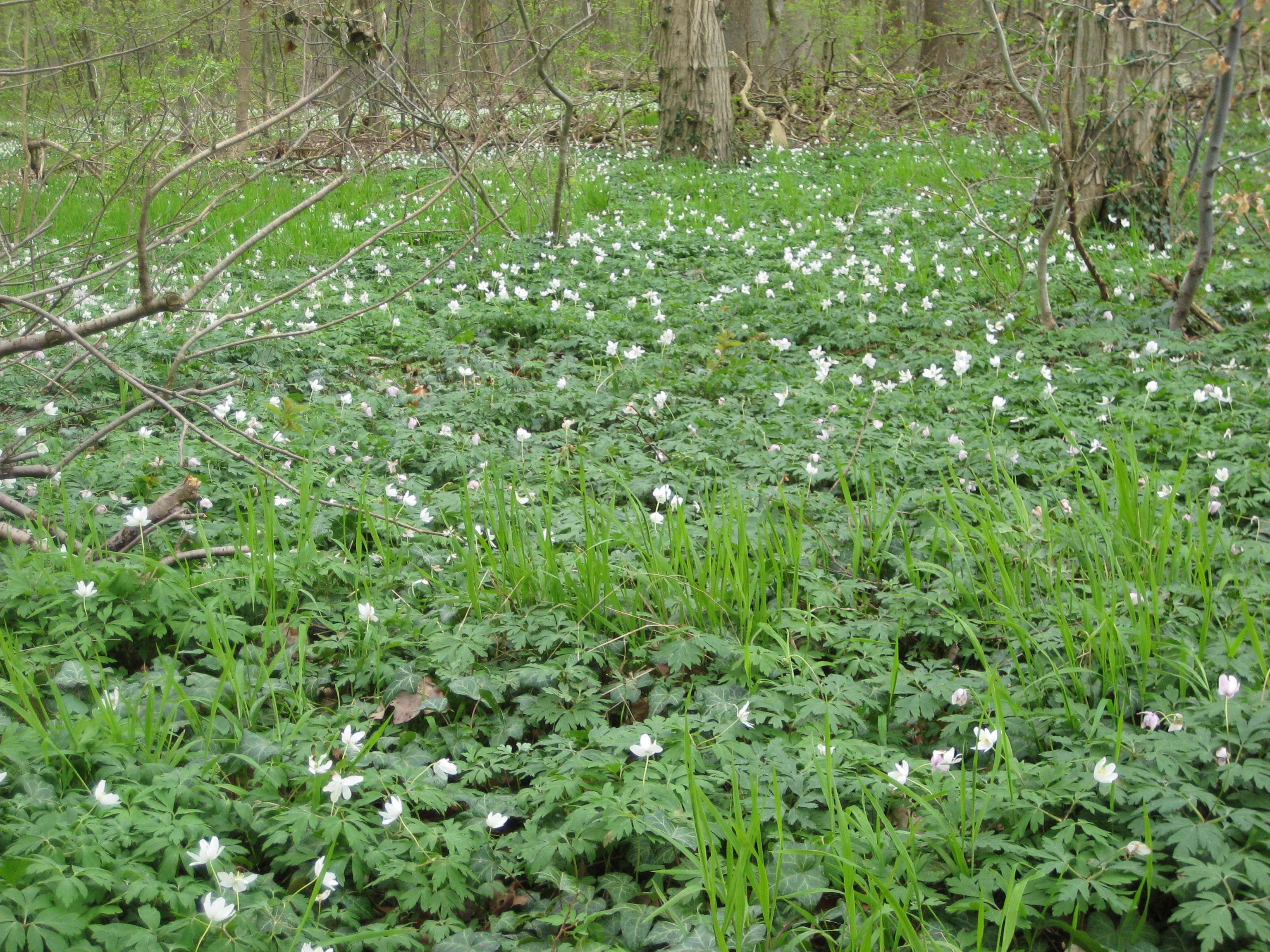 Frühblüher im Lauerholz im April, aufgenommen von der Travemünder Allee